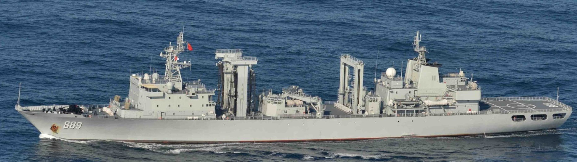 １２月２７日（土）午後２時半頃、海上自衛隊第８護衛隊「すずつき」（佐世保）及び第４航空群所属「Ｐ－３Ｃ」（厚木）が、上対馬の北東約３１０ｋｍの海域を南西進する中国海軍ルフ級駆逐艦１隻、ジャンカイⅡ級フリゲート２隻及びフチ級補給艦１隻の合計４隻を確認した。 その後、当該艦艇が対馬海峡を南下したことを確認した。 なお、これら４隻の中国艦艇は１２月４日（木）に大隅海峡を東航し、その後、西太平洋で活動、１２月２５日（木）に宗谷海峡を西航したものと同一である。